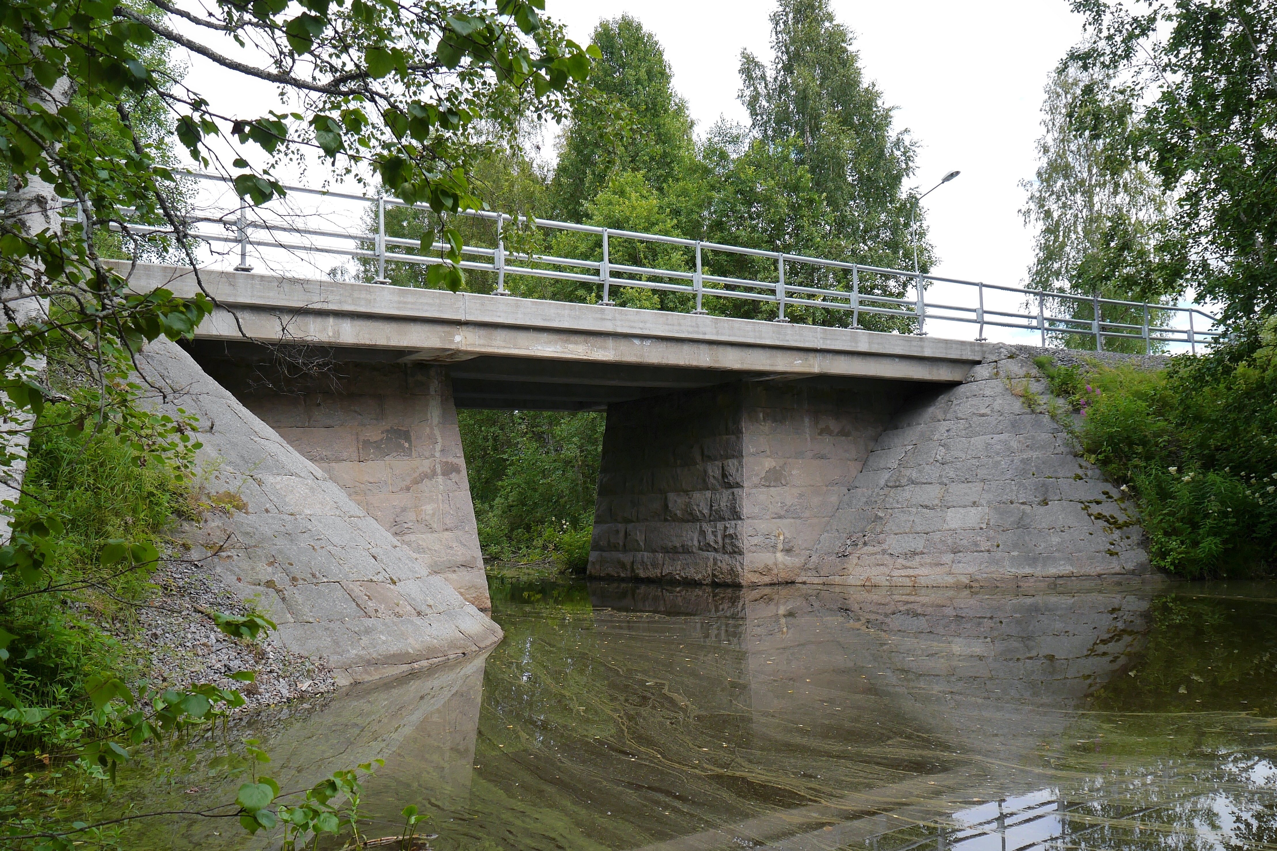 Bro över Kvarnbäcken i Vittjärv, Boden. Bron är klassad som kulturhistoriskt värdefull. Bronummer: BD 288 Byggår: 1935. Längd: 16,8 meter Spännvidd: 5,9 meter Bredd: 7,0 meter